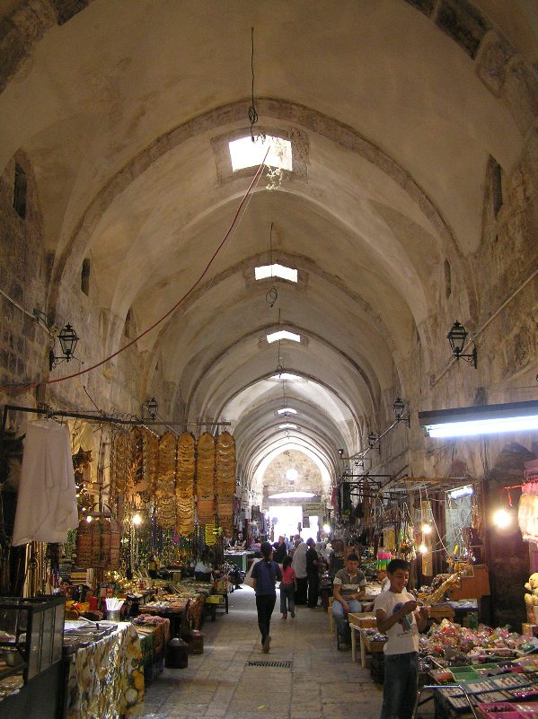 The Cotton Sellers Market street, leading to the Temple Mount in Jerusalem. רחוב שוק מוכרי הכותנה, המוביל להר הבית, בירושלים by eman, June 2005